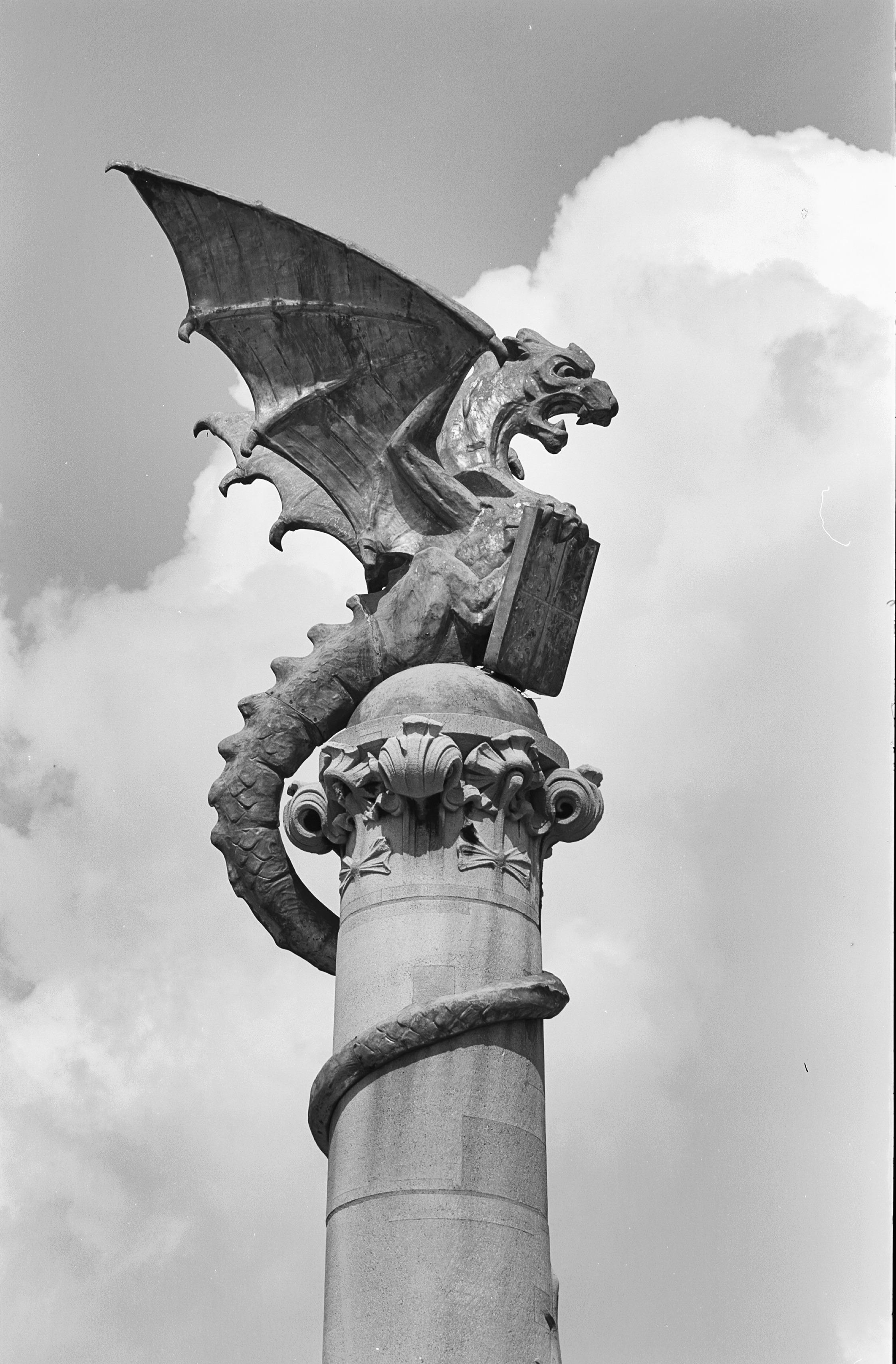 Diversen: fontein bekroning